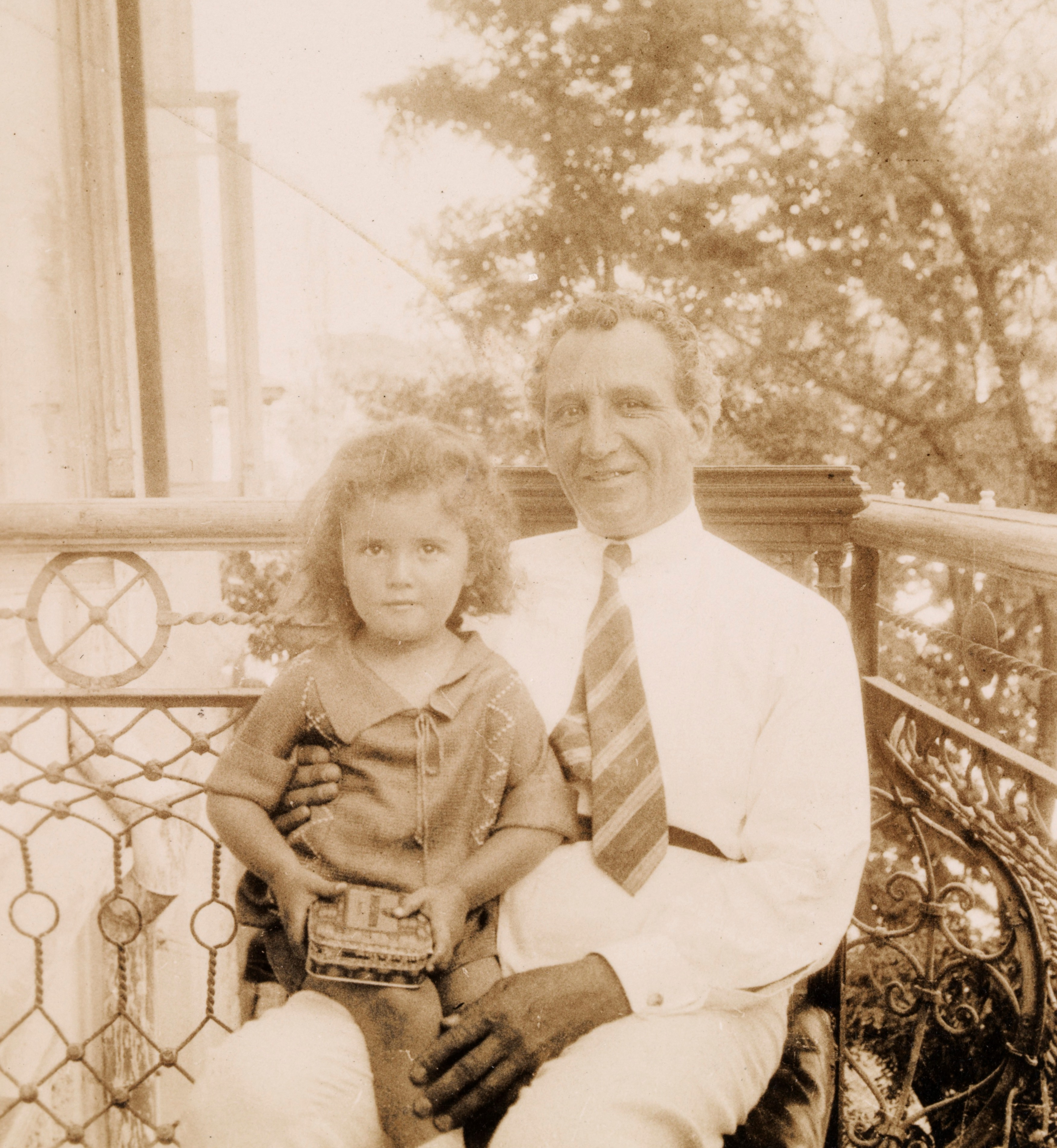 Korkmasov, presidenten for den lokale regjeringen i Daghestan (en autonom republikk som er en del av den store republikken Russland). Han sitter ute på balkongen i leiligheten i Sadursky. Depicted person: Korkmasov Depicted place: Russland, Machackala